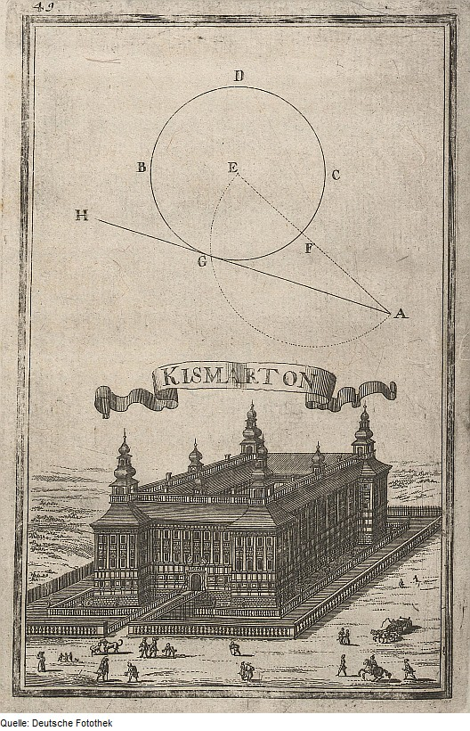 Original image description from the Deutsche FotothekGeometrie & Architektur & Festungsbau & Vermessung